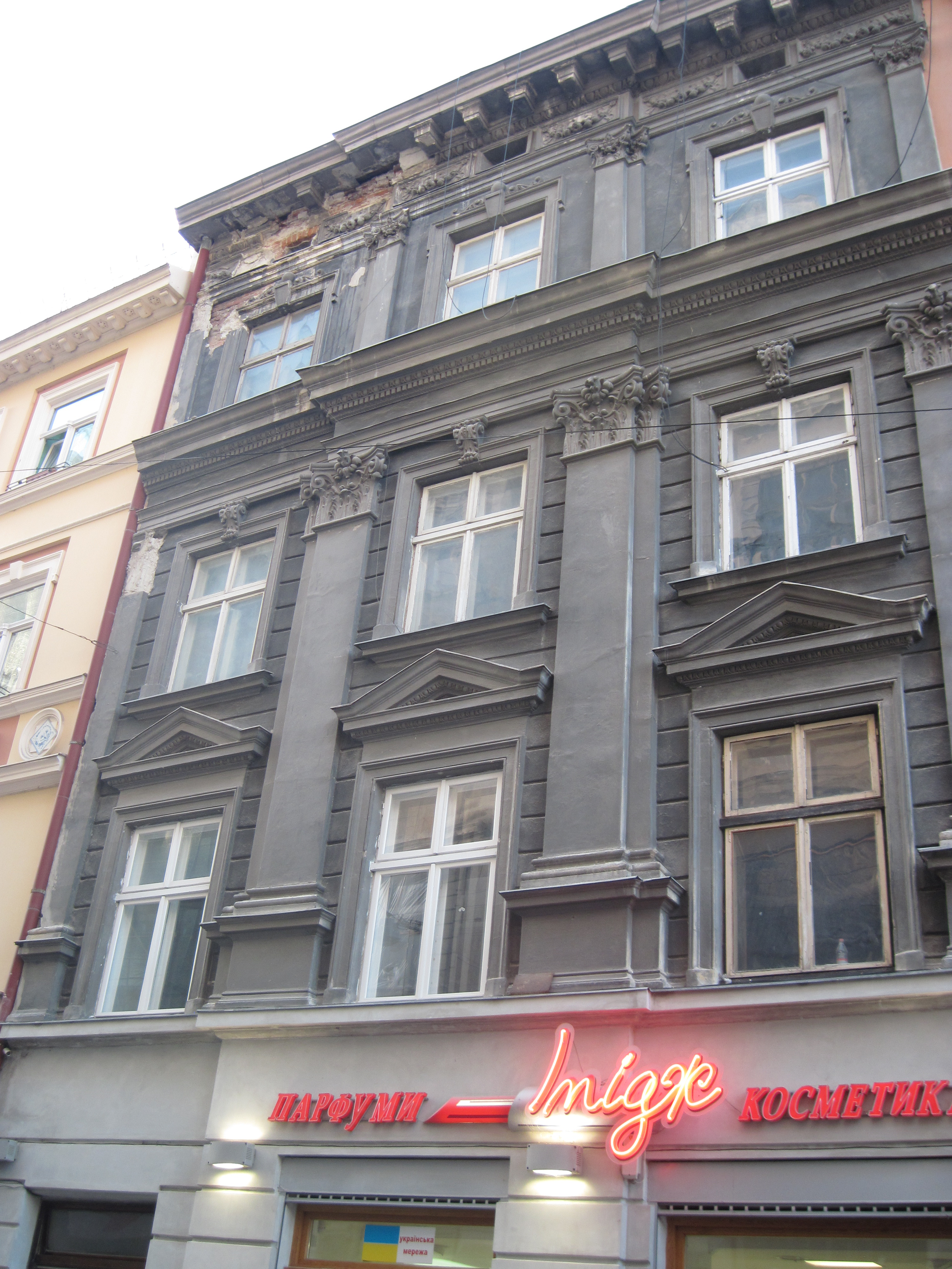 Кам'яниця Боймів, Львів